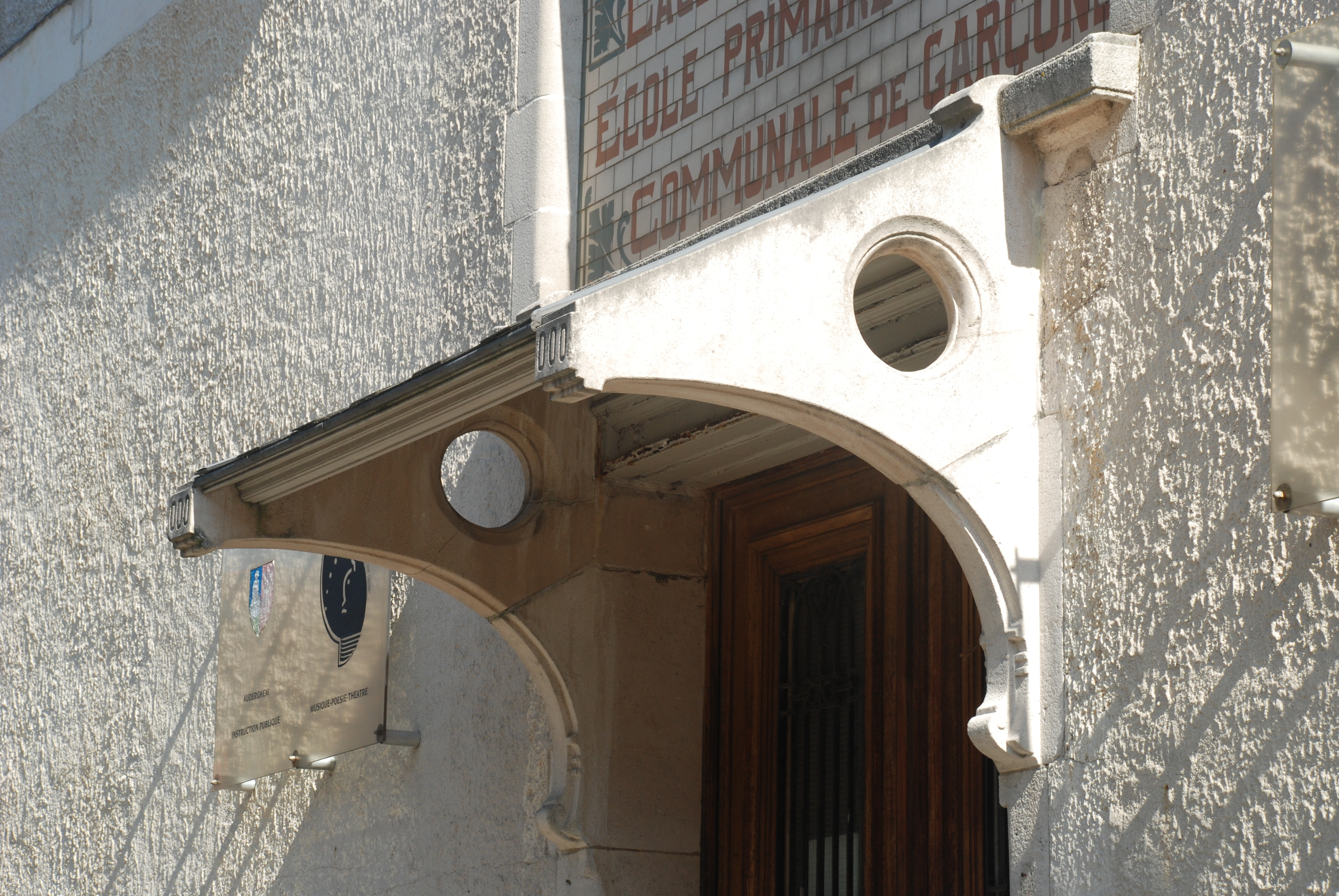 Belgique - Bruxelles - Centre scolaire du Souverain